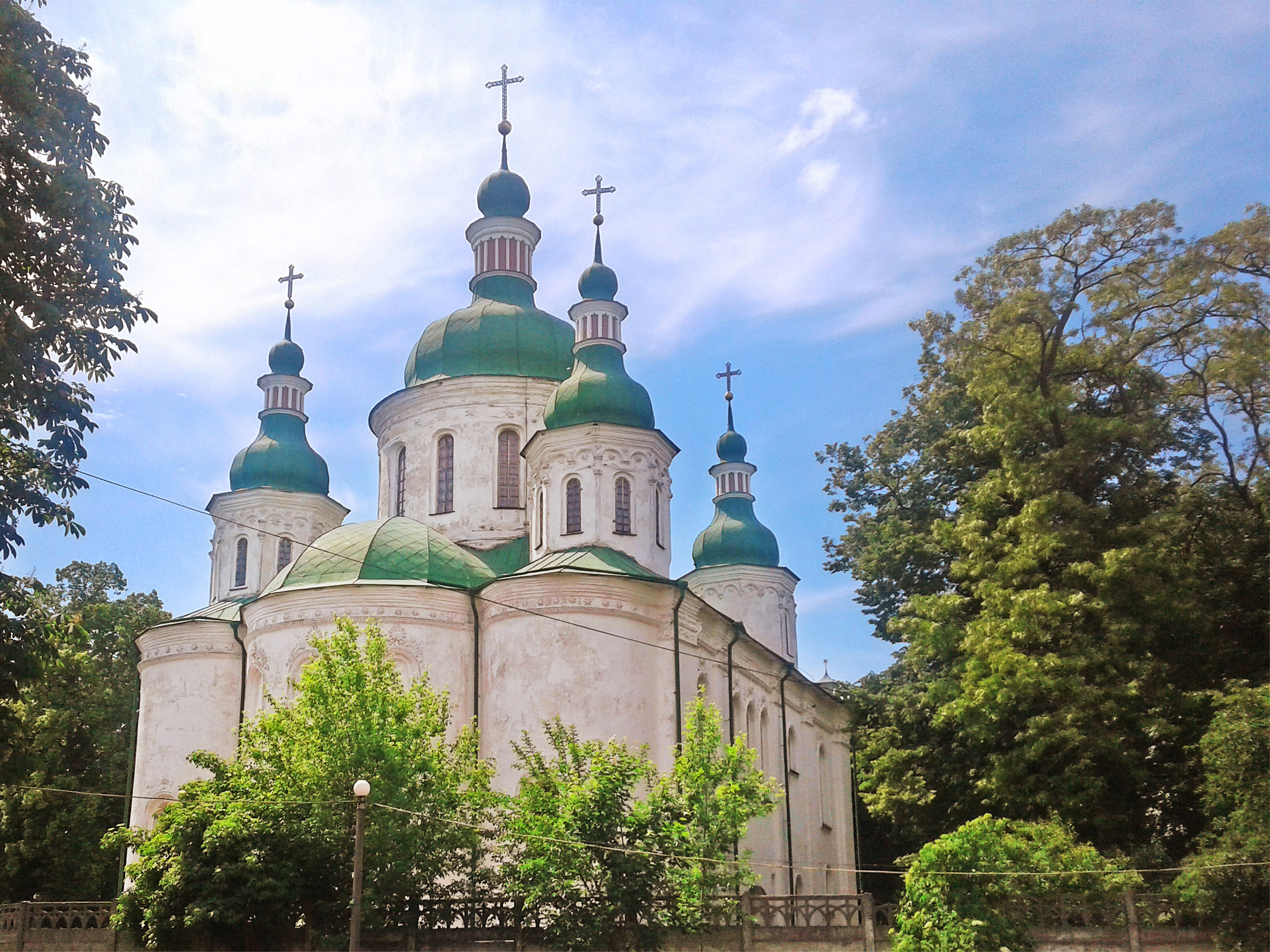 Кирилівська церква, Київ, Теліги Олени вулиця, 12 (Кирилівська вул., 103